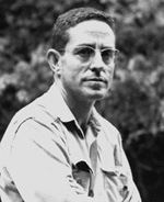 Retrat de Jordi Sabater Pi